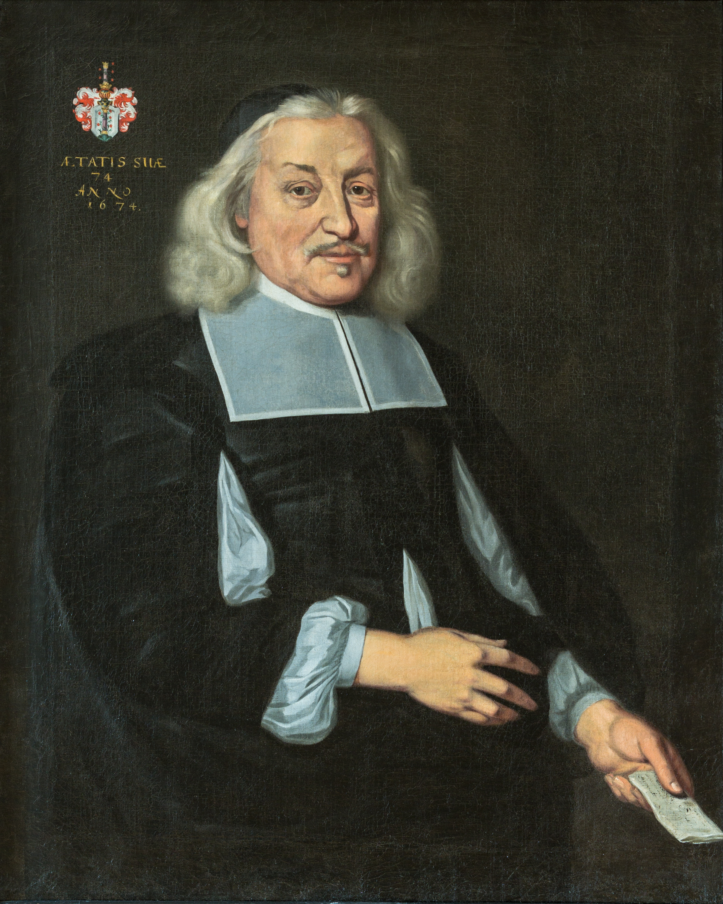 Marc Otto (1600-1674). Avocat de la Ville et plénipotentiaire de Strasbourg aux conférences aboutissant aux traités de Westphalie. Auteur d'une Fondation portant son nom encore existante. Peinture à l'huile sur toile le représentant à l'âge de 74 ans en 1674 (AETATIS SUAE 74 ANNO 1674) et identifié par l'adresse de la lettre qu'il tient de la main gauche : "Wohlgelehrten.. Marc Otto... der Rechten Doctorn und der Stadt Strassburg Diplomaten, zu Strassburg".